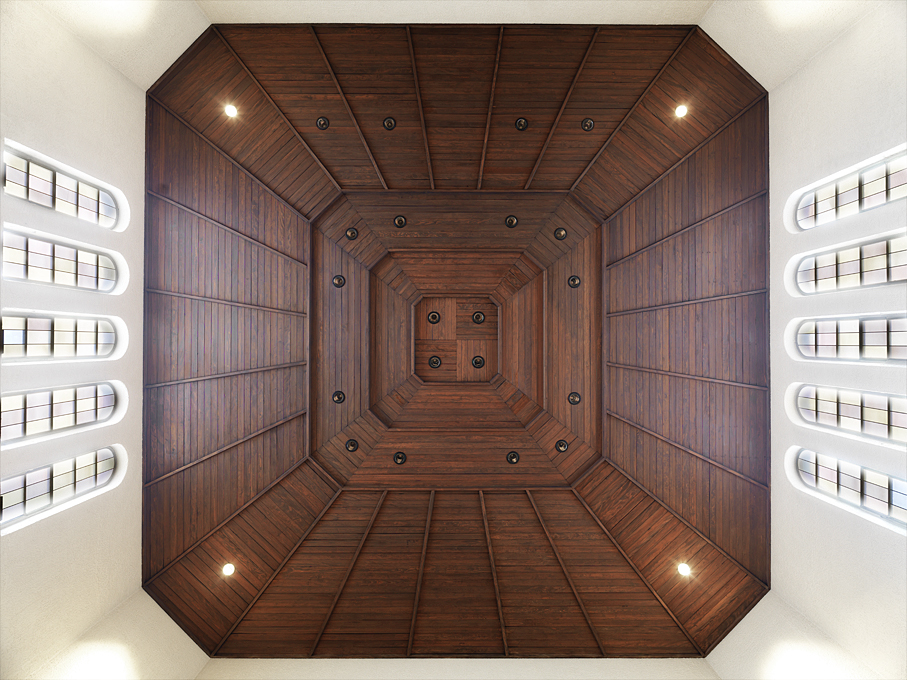 Römisch-katholische Kirche St. Martin, Zürich, Decke